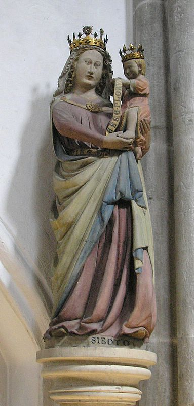 Dom zu Eichstätt (Oberbayern). Die "Sibotomadonna" (1296) im Westchor . Eigene Aufnahme, April 2007 / Eichstaett cathedral (Upper Bavaria, Germany). Western choir. "Sibotomadonna" (1296). Own photo, April 2007